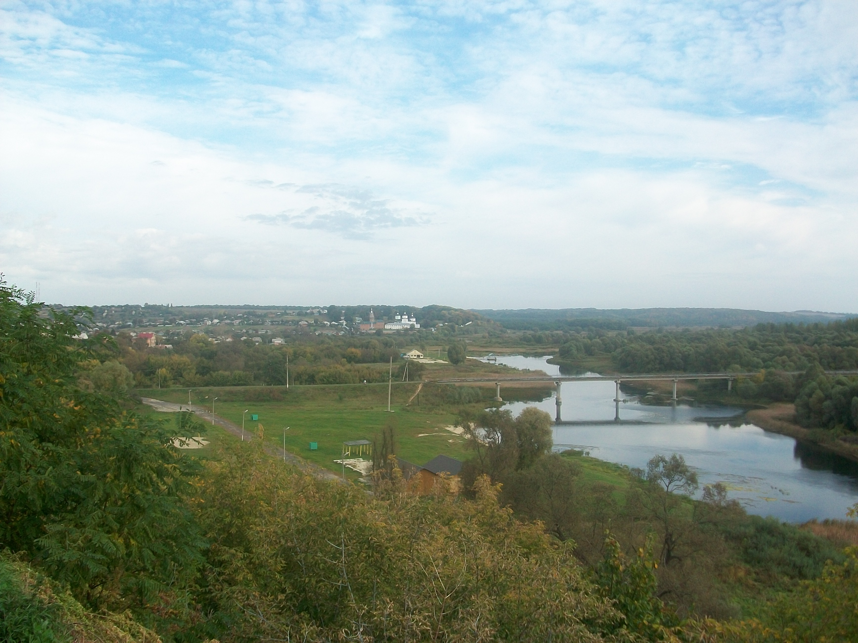 Вид з «Горы Ивана Рыльского» (Рыльск)